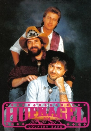 Peter Behrendt, Achim Krüger, Gerd Wagner, v.o.n.u.